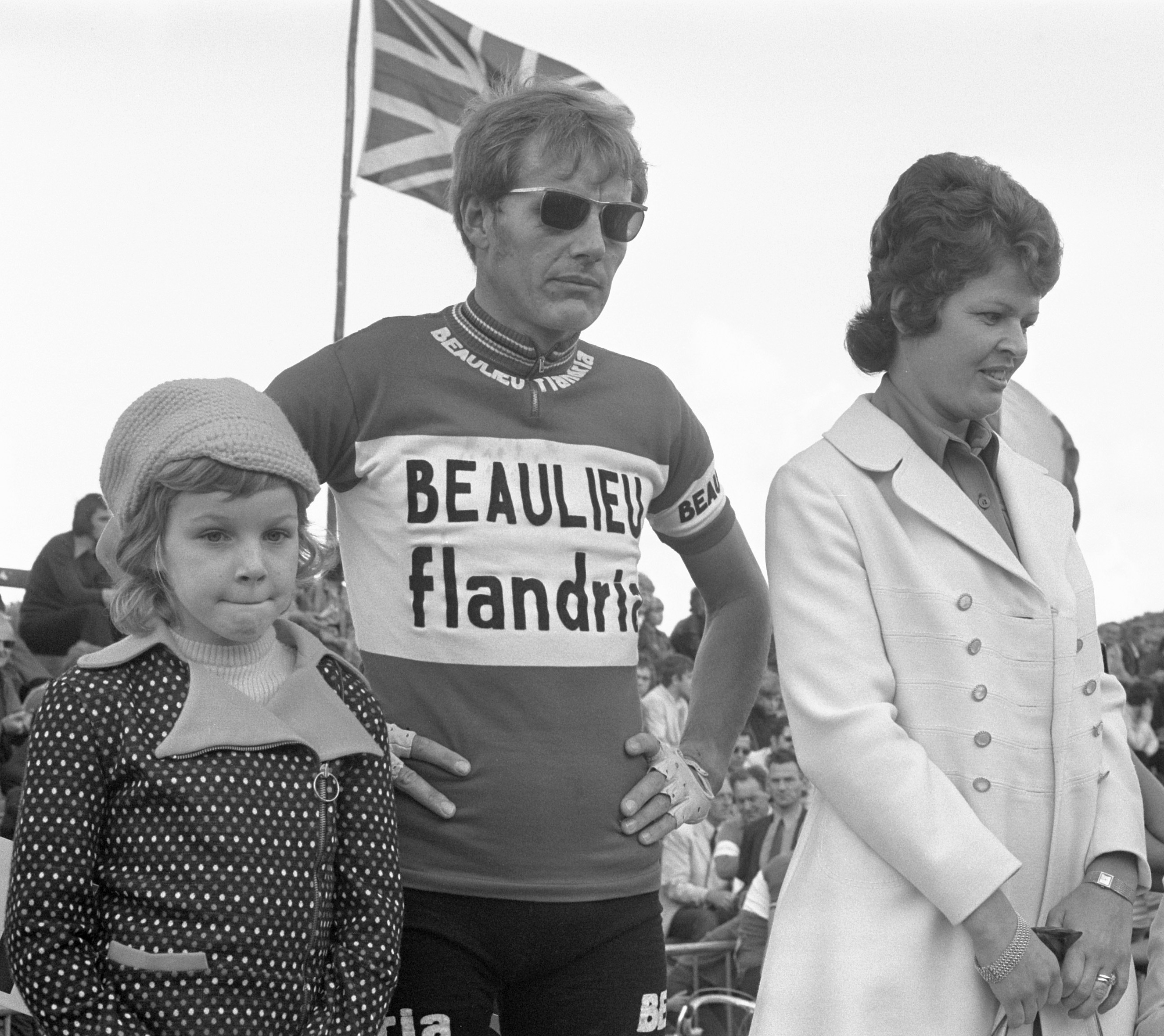 Jan Janssen neemt afscheid van wielersport tijdens Ronde van Kortenhoef, tijdens huldiging met echtgenote en dochter